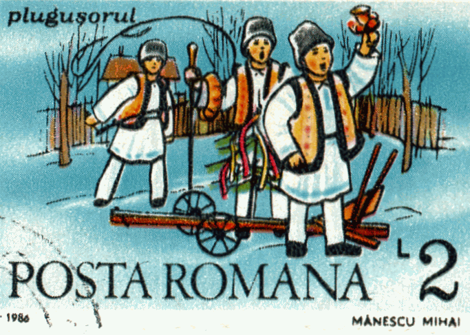 Sorcova, 1986, Mănescu Mihai Source: Post of Romania